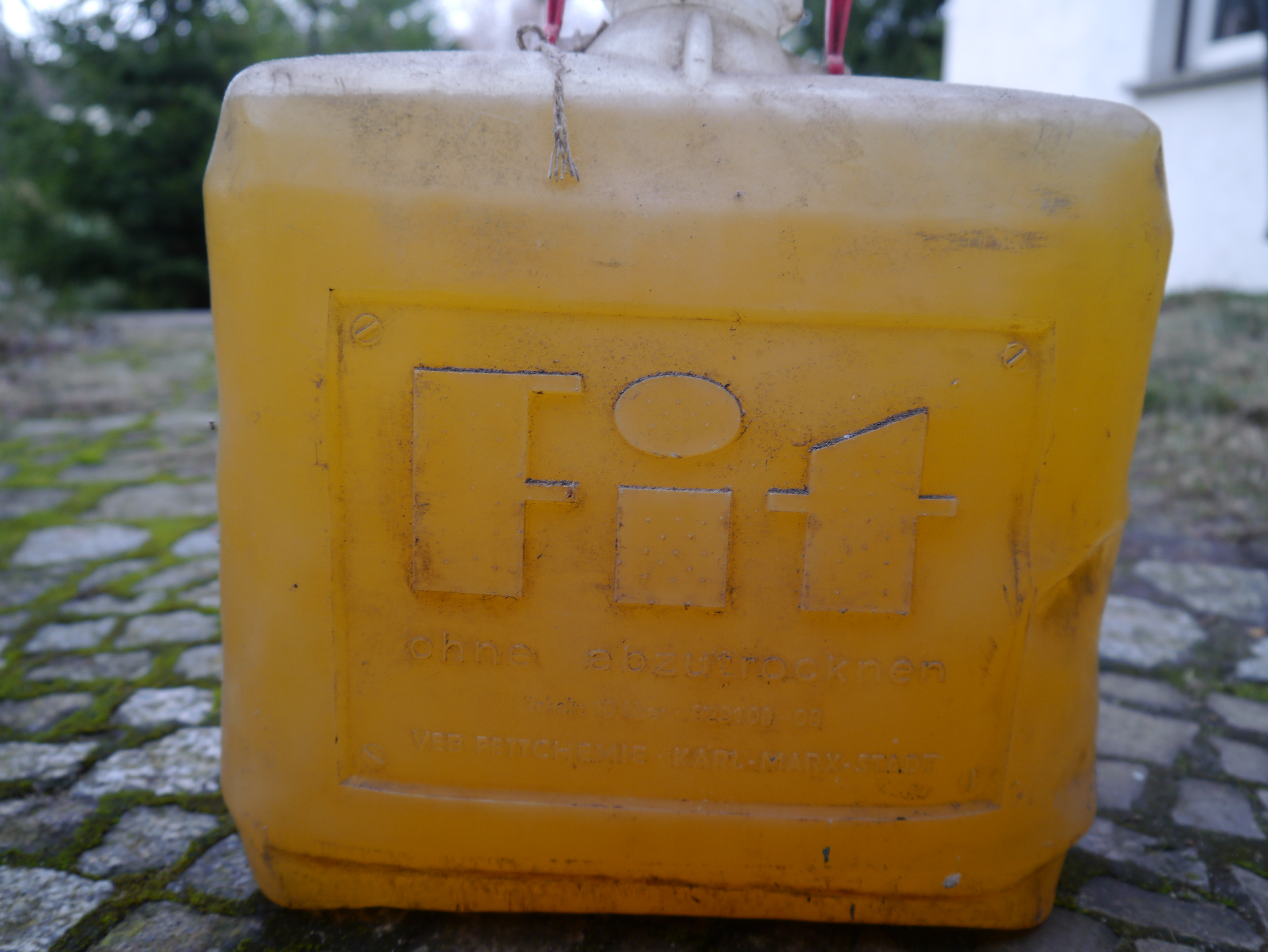 FIT Reinigungsmittel im Großbehälter (DDR)